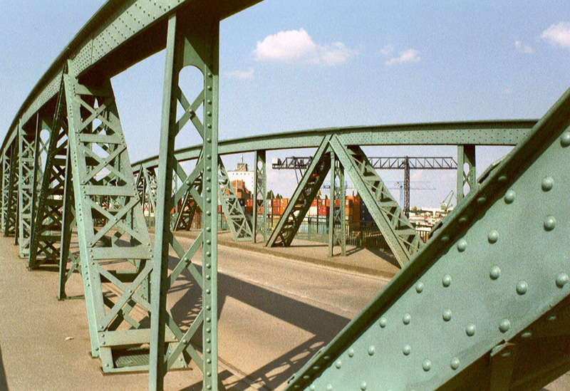 Brücke Schmickstraße befindet sich inmitten des Frankfurter Osthafens, genauer gesagt überspannt sie das südliche Becken.